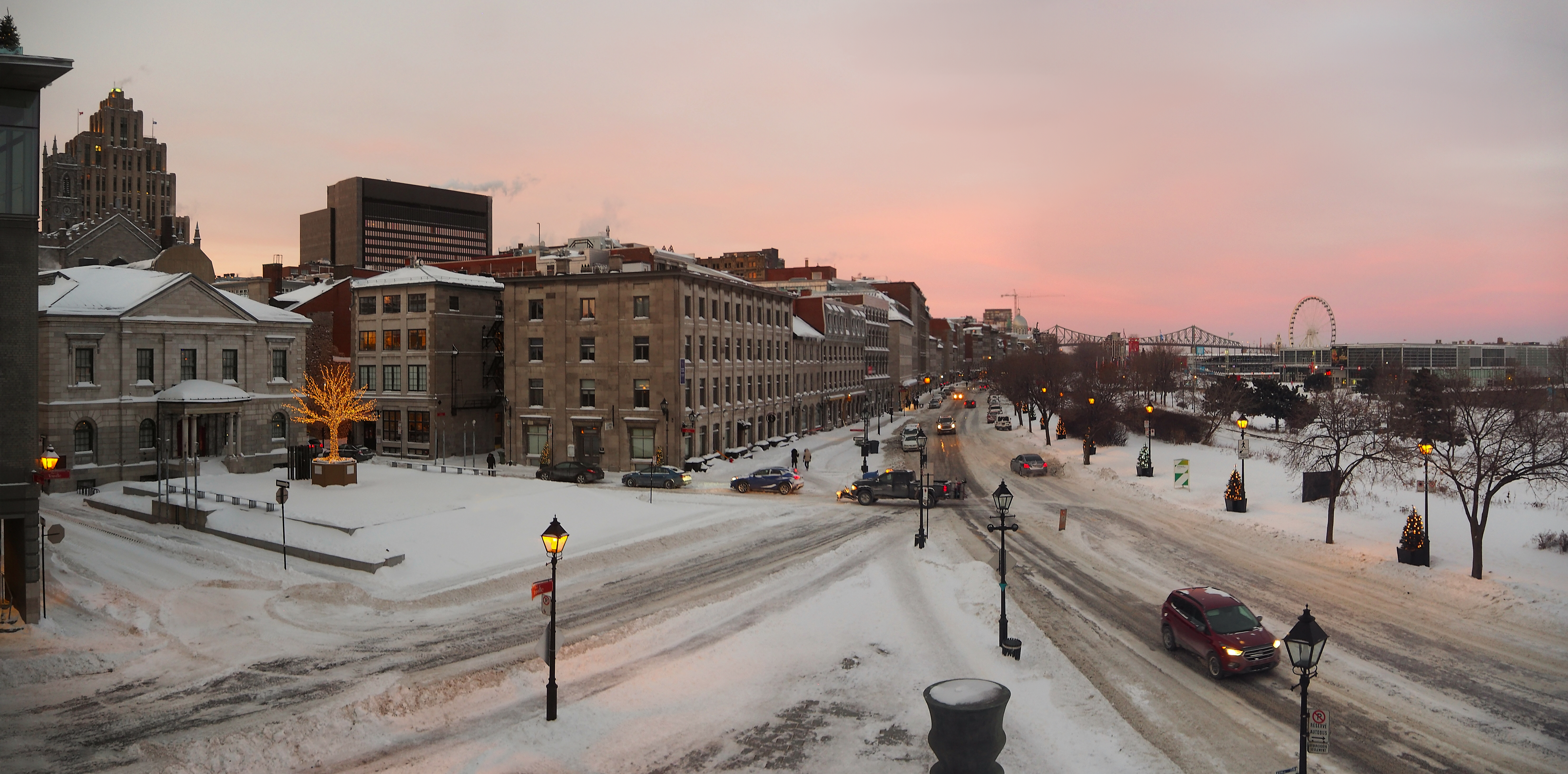 Rue de la Commune et Place d'Youville, vue du musée Pointe-à-Callière, 2018-01-06. Vue prise du musée Pointe-à-Callière.